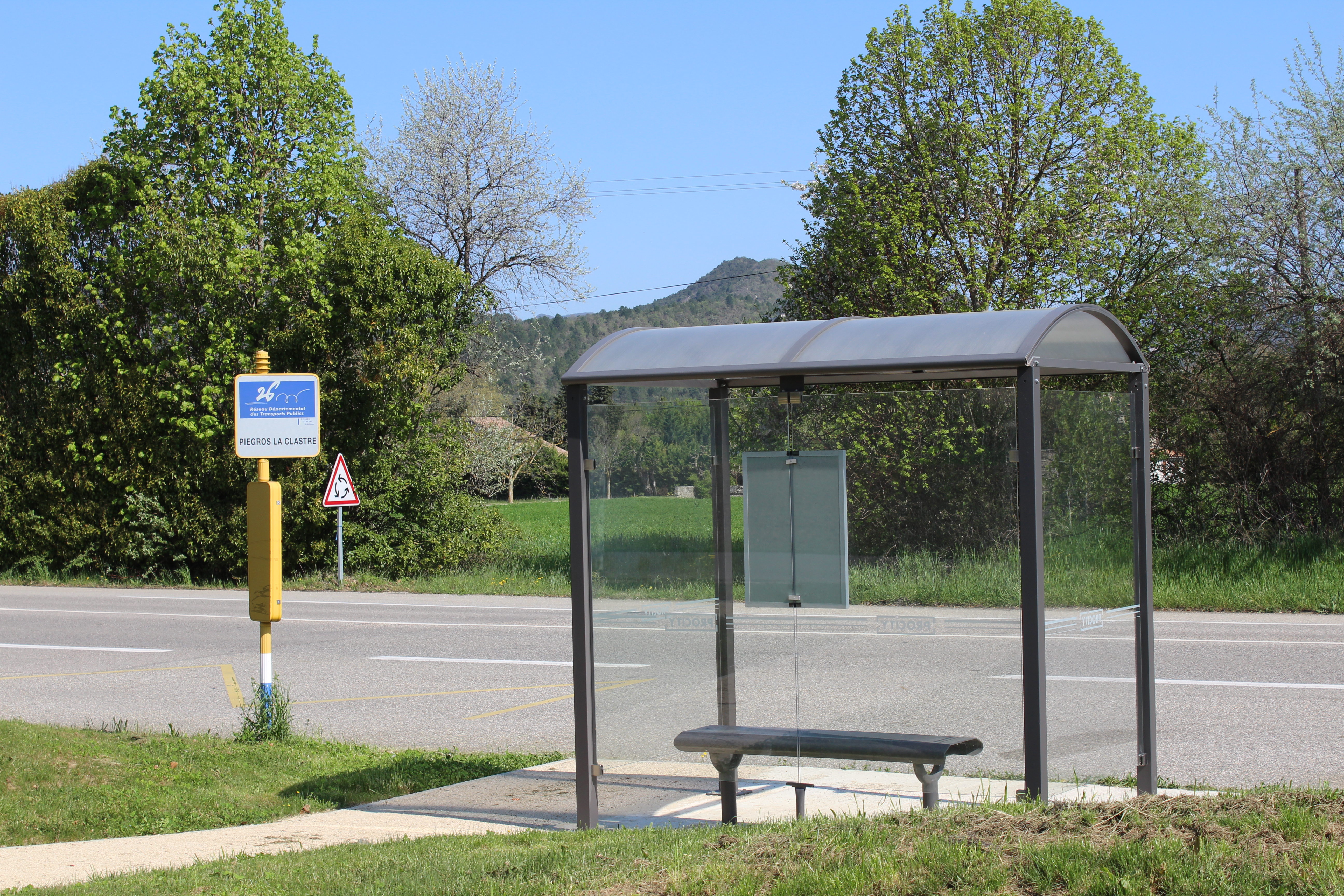 Photographie de l'arrêt de bus de la commune de Piégros-la-Clastre